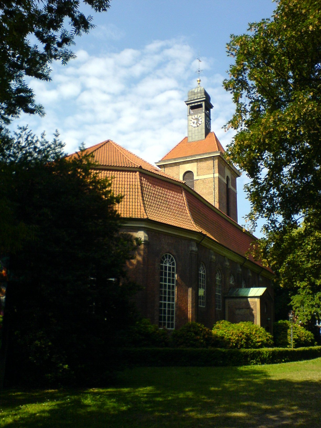 Die evangelisch-lutherische Christianskirche (auch Klopstockkirche genannt) in Hamburg-Ottensen.